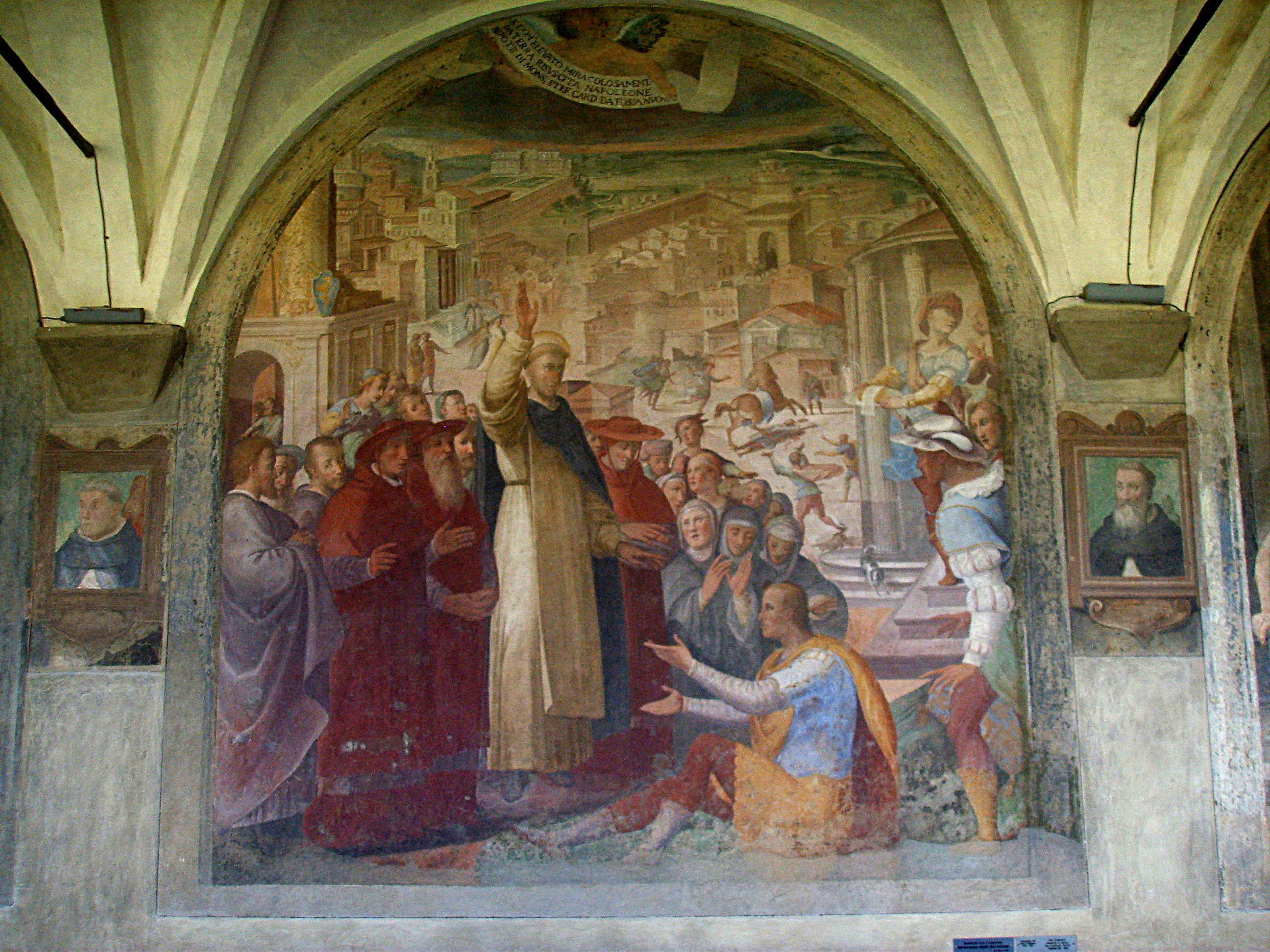 Alessandro Fei detto "il barbiere":, San Domenico resuscita Napoleone Orsini, nipote del Cardinale Orsini. Fresco in the "Chiostro Grande" in "Santa Maria Novella" church in Florence, Italy